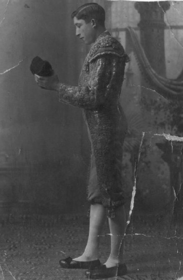 Antonio Flores Díaz "El Monicha" vestido de luces en 1935.